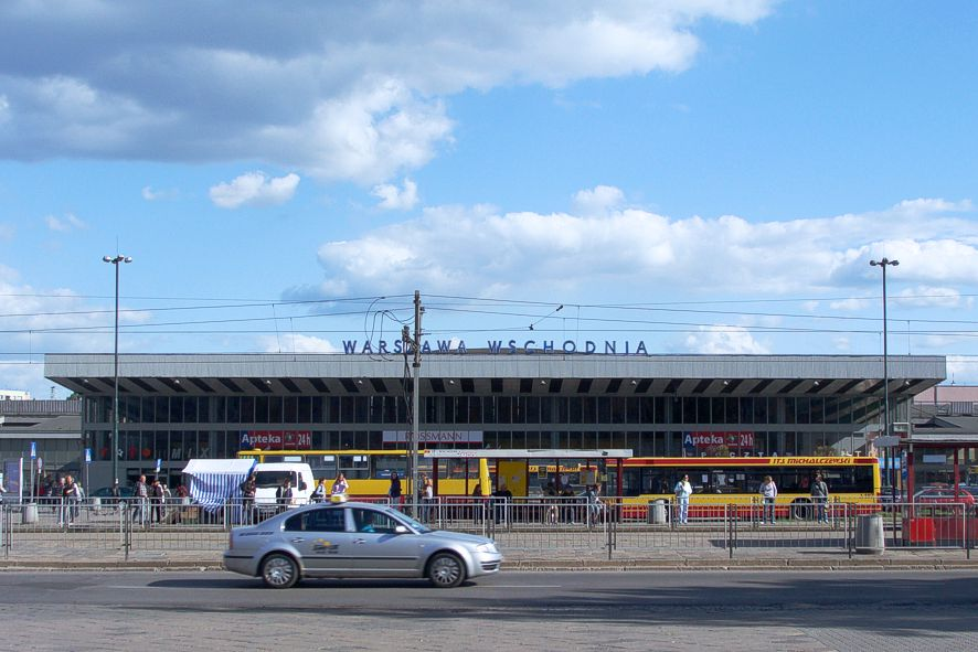 Dworzec Wschodni w Warszawie od strony ulicy Kijowsjkiej przed remontem w maju 2009